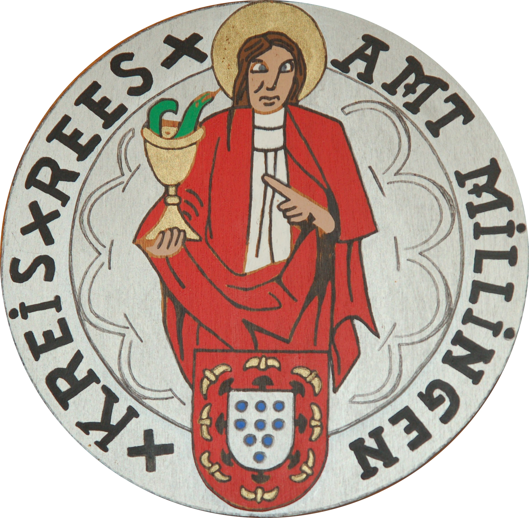 Siegel des Amtes Millingen. Nachbau aus Holz und Farbe